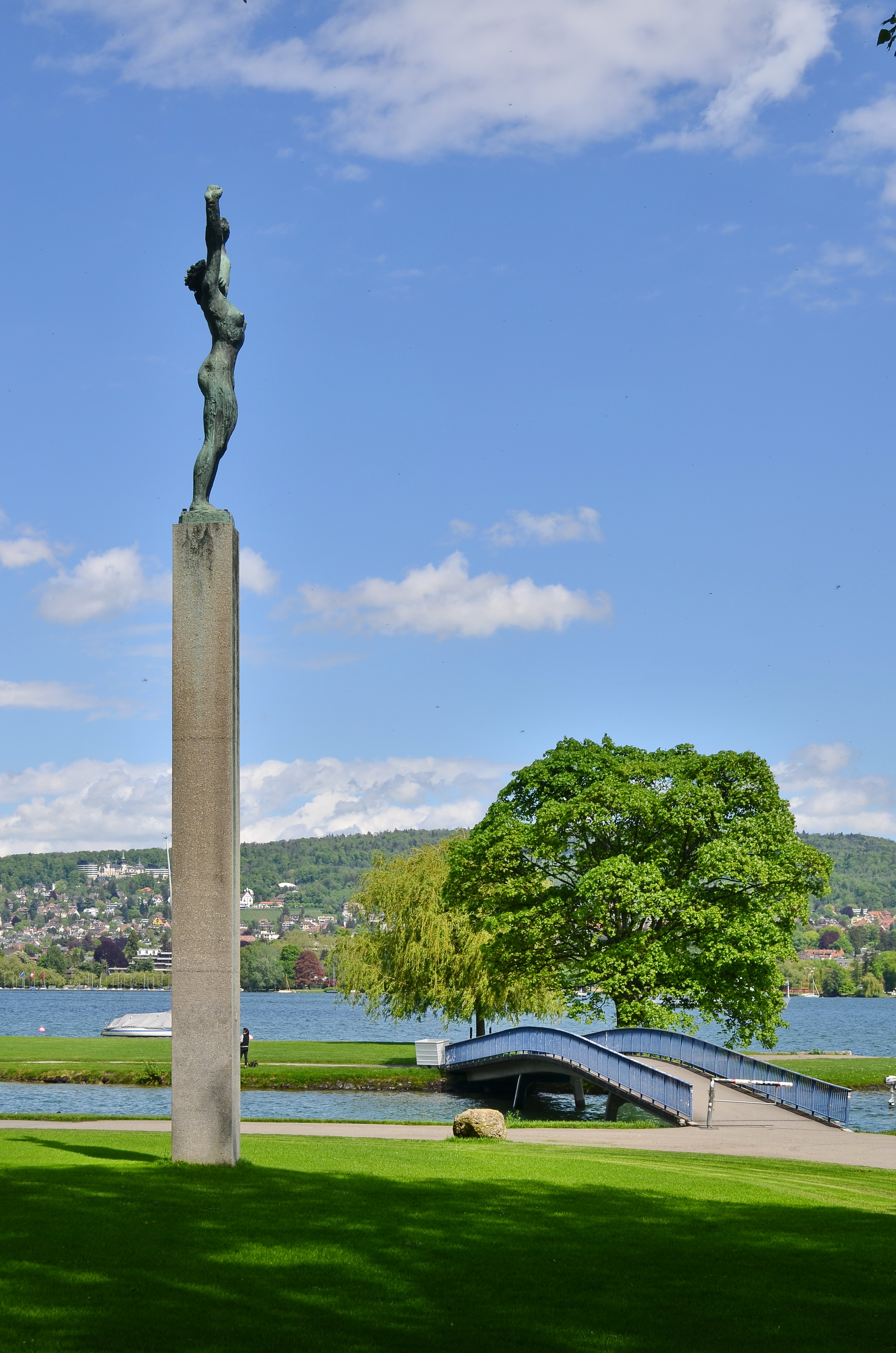 Mädchen mit erhobenen Händen (Hermann Haller), Landiwiese in Zürich-Wollishofen, Saffa island and Adisberg in the background.